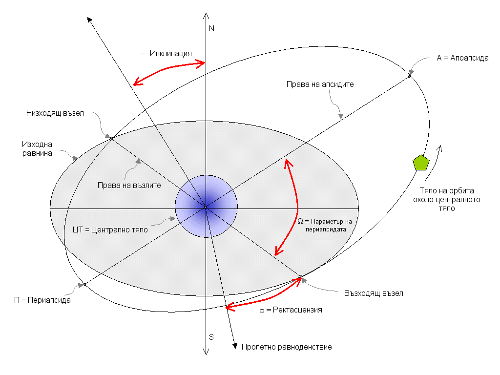 Орбита и орбитални параметри.